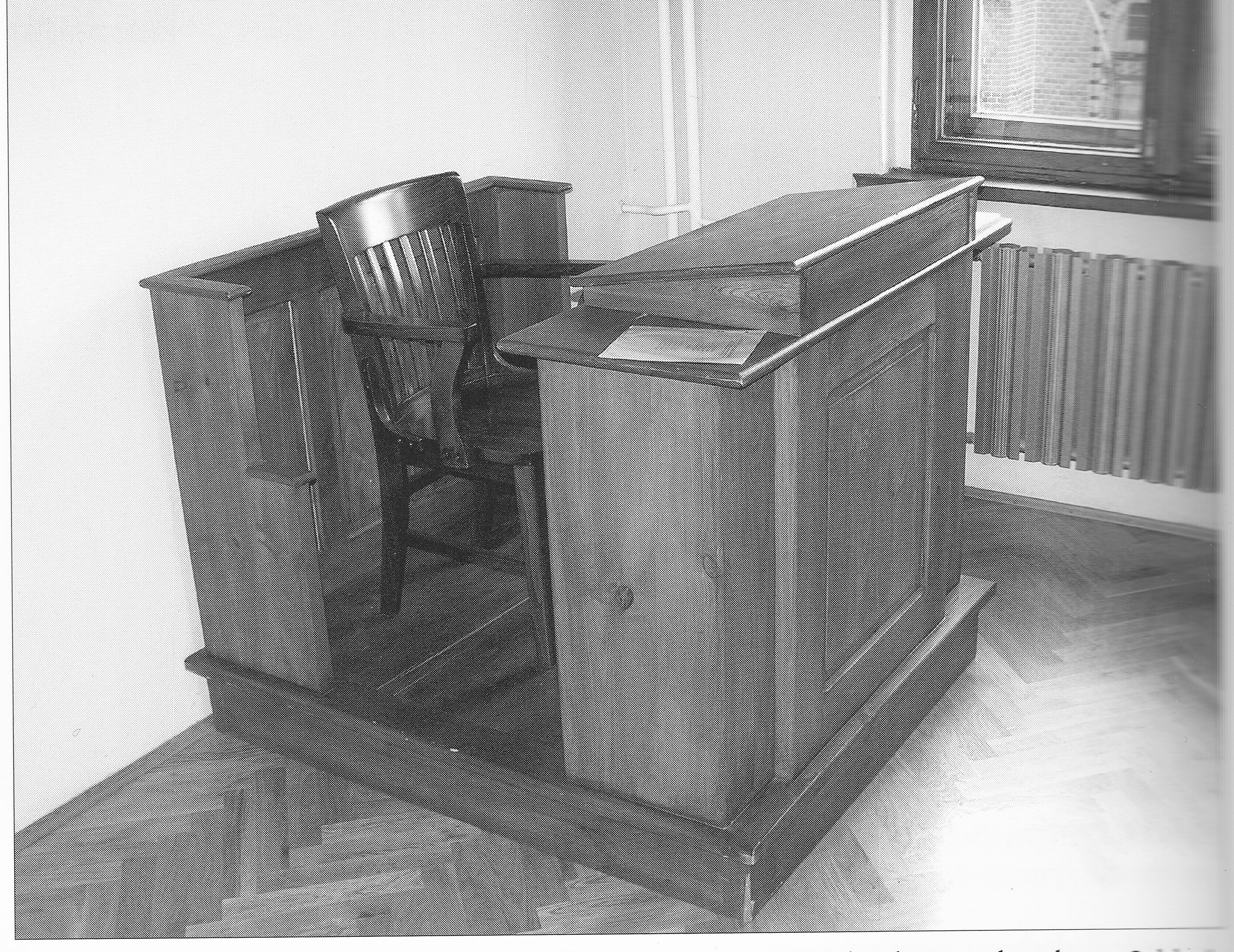 Katheder in der „Schola“ des Studienhauses der ehem. Schlesischen Franziskanerprovinz, Aufn. 2005 Quelle: Joachim Schmiedl (Hrsg.): Vom Kulturkampf bis zum Anfang des 21. Jahrhunderts. (Geschichte der Sächsischen Franziskanerprovinz von der Grüdung bis zum Anfang des 21. Jahrhunderts Bd. 3) Ferdinand Schöningh, Paderborn-München-Wien-Zürich 2010, ISBN 978-3-50676991-6, Abb. 47